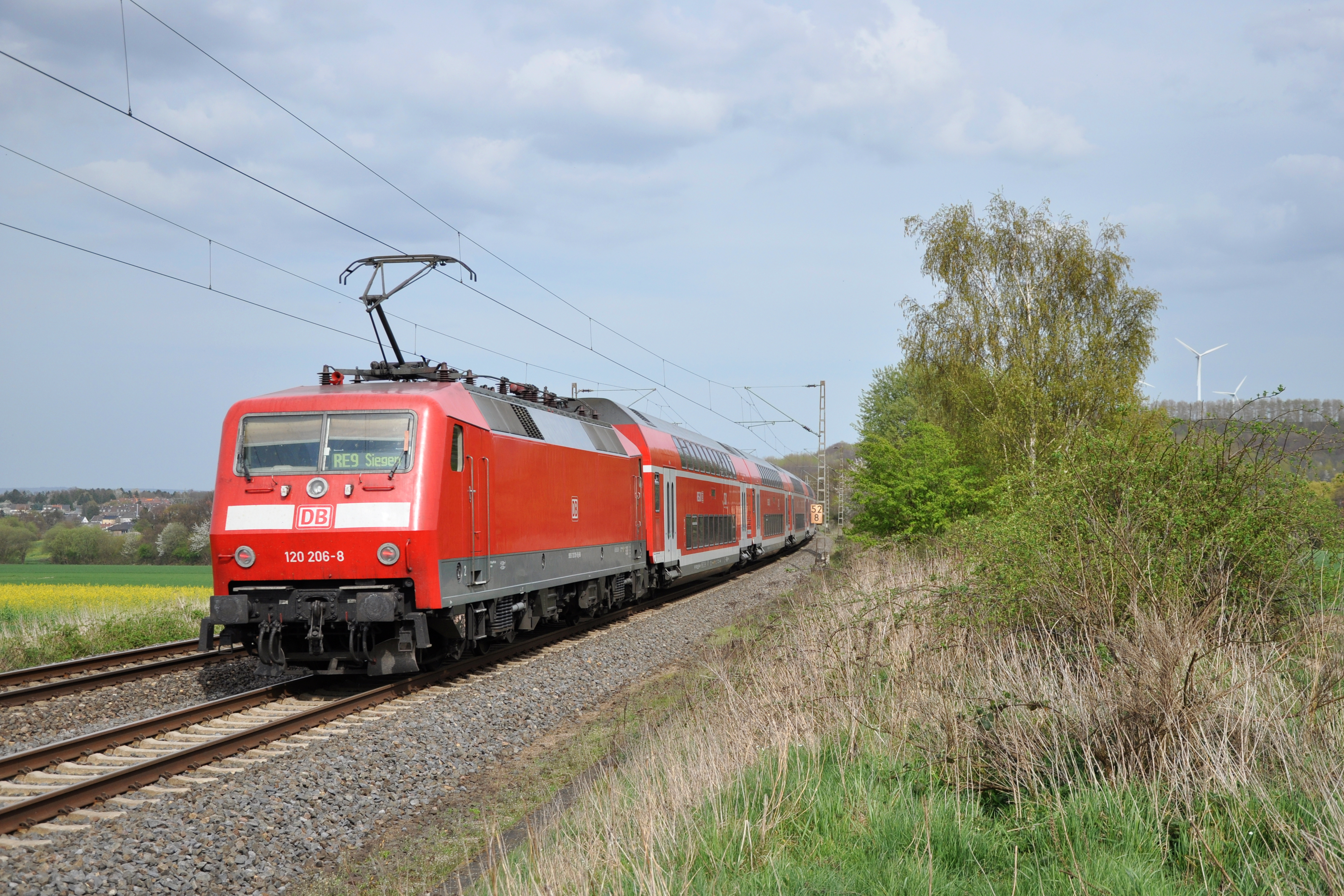 Umgekehrte Wagenreihung, üblicherweise zeigt der Steuerwagen in Richtung Aachen.